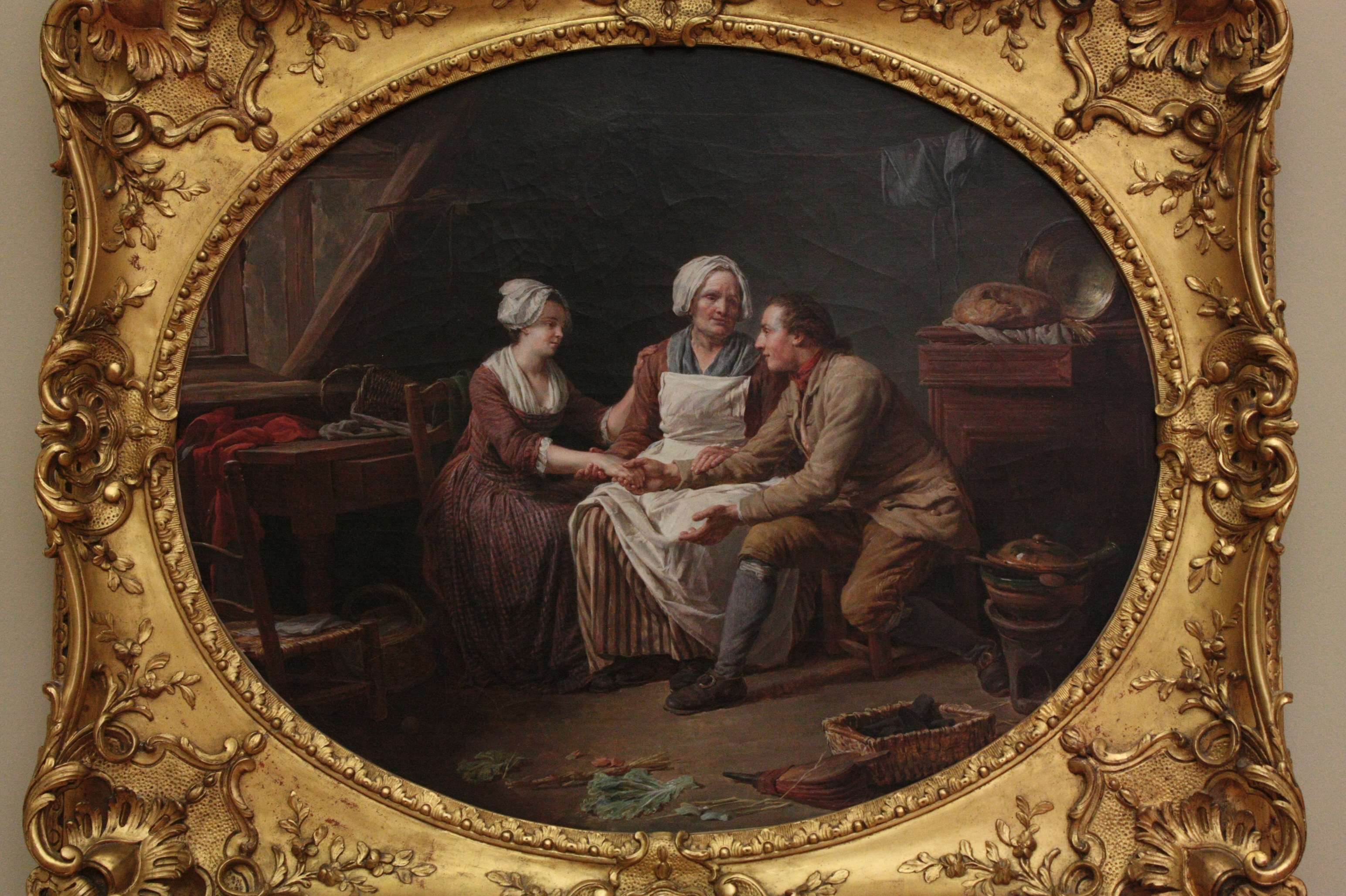 Les Accords ou La Promesse approuvée de Nicolas-Bernard Lépicié, 1774.